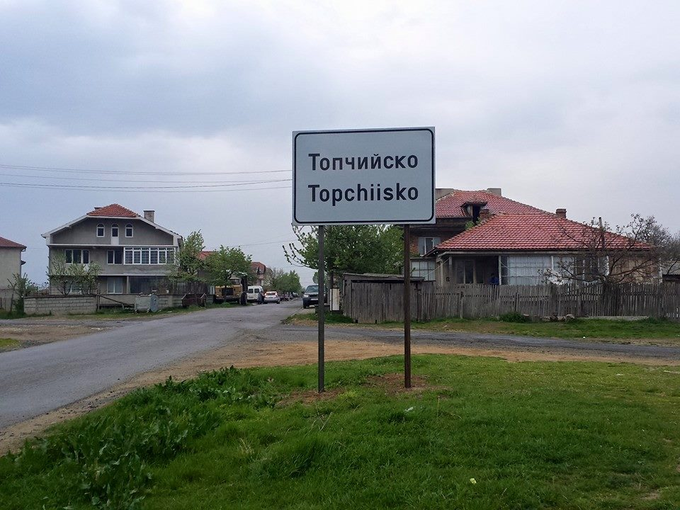 Topçuköy girişi